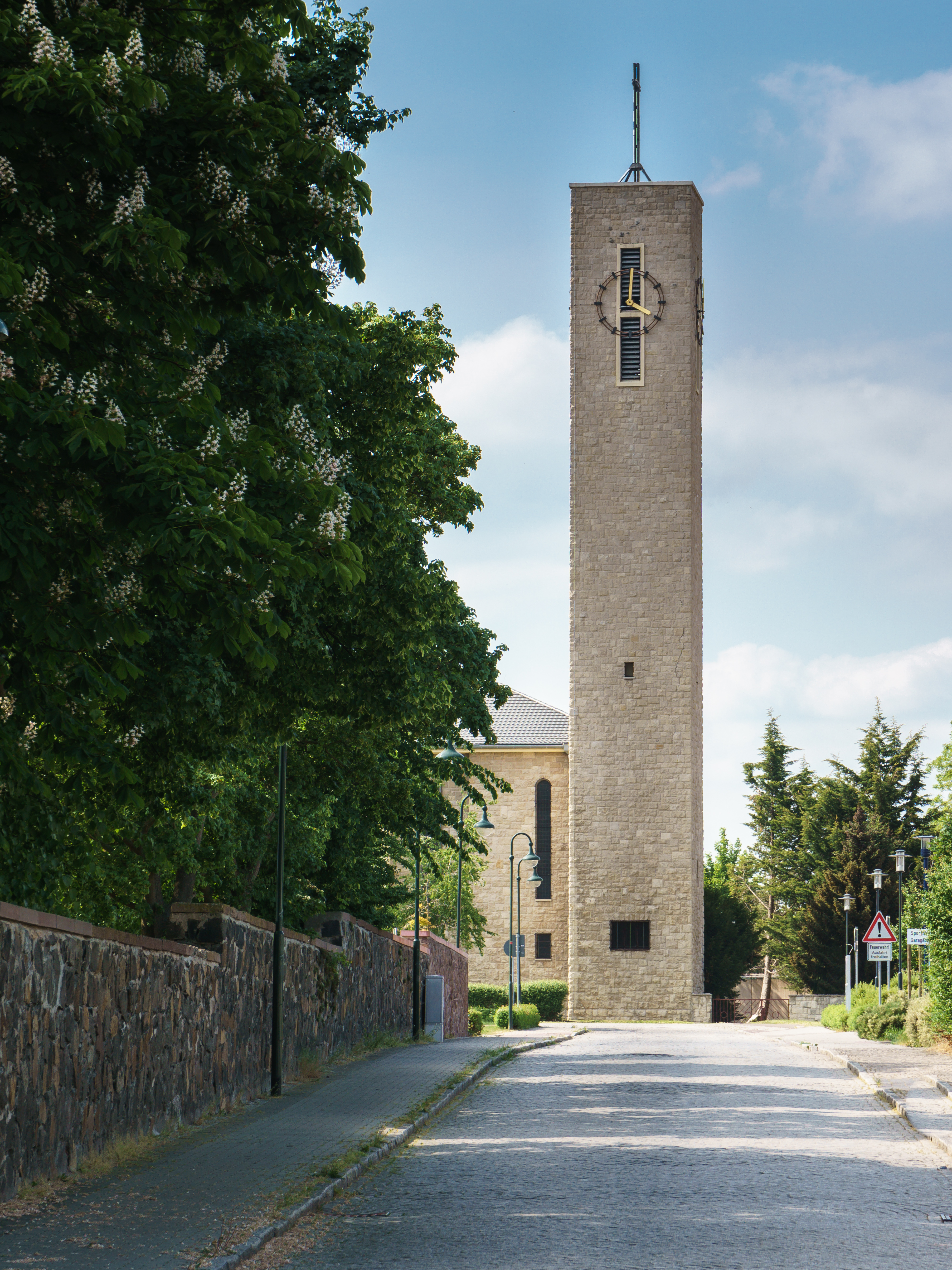 Katholische Pfarrkirche Christkönig, Hockergasse 3 in Leuna